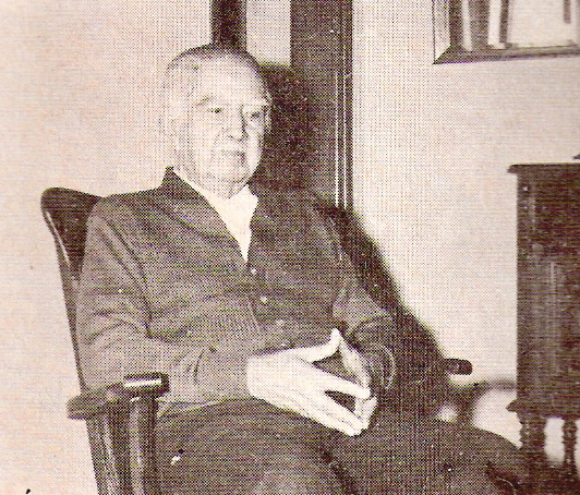 Roberto Díaz, filósofo argentino